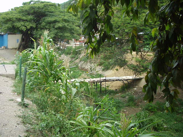 Macarao River. Libertador Municipality, Capital District (Caracas), Venezuela.